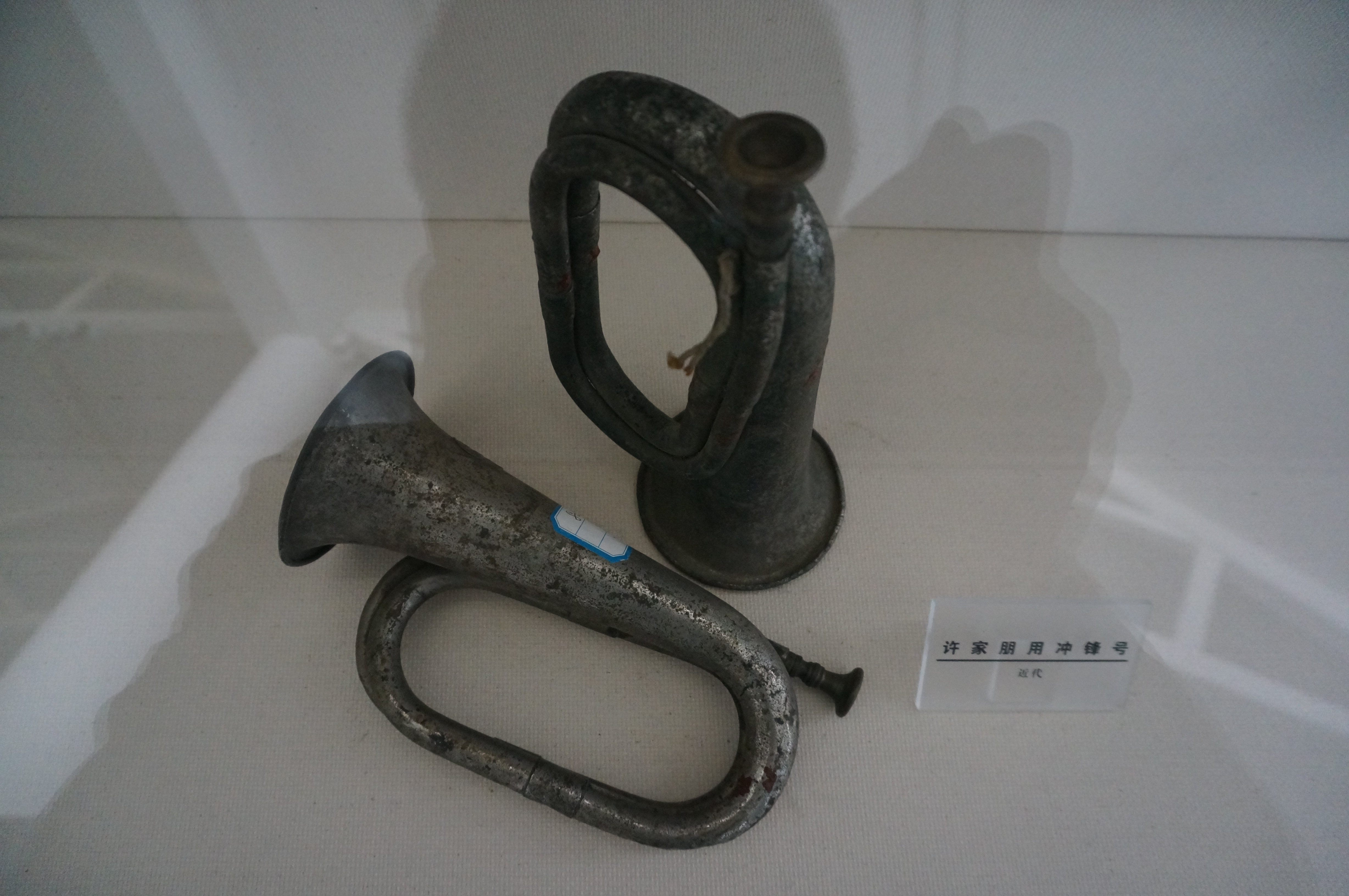 近代许家朋用冲锋号。